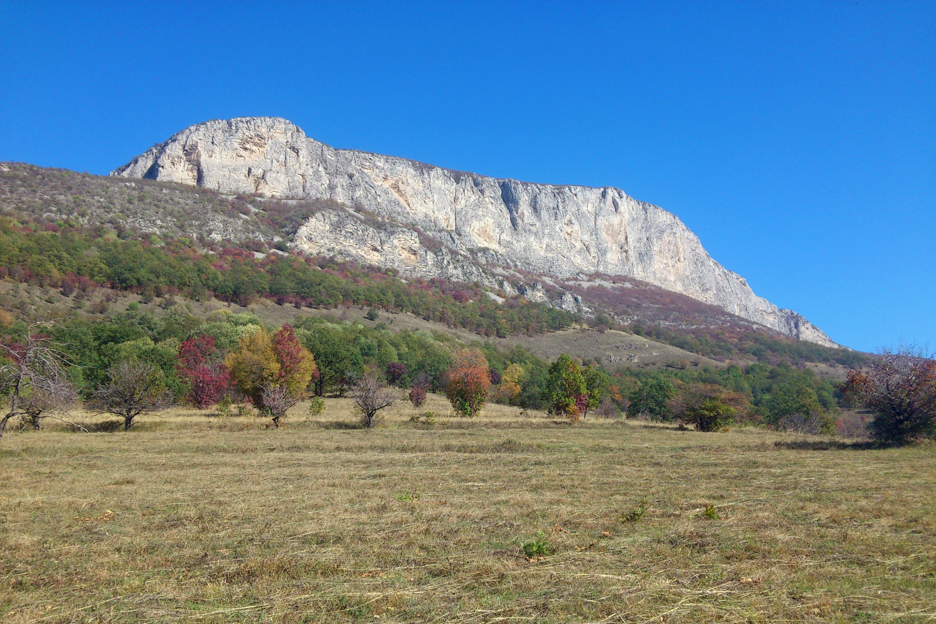 Врачански Балкан